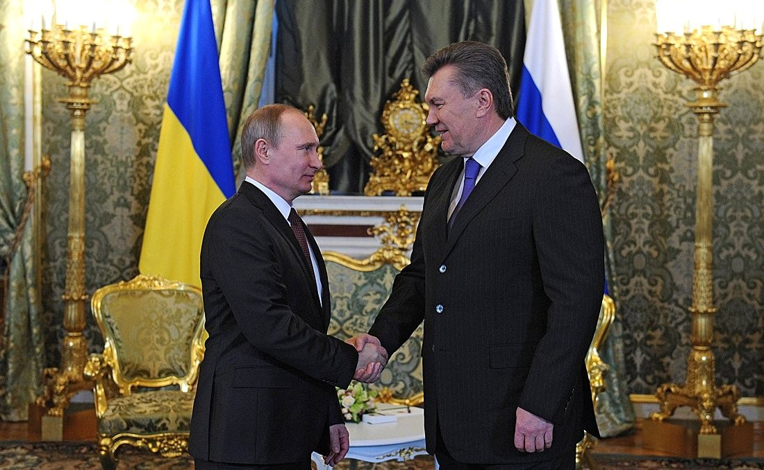 Встреча с Президентом Украины Виктором Януковичем